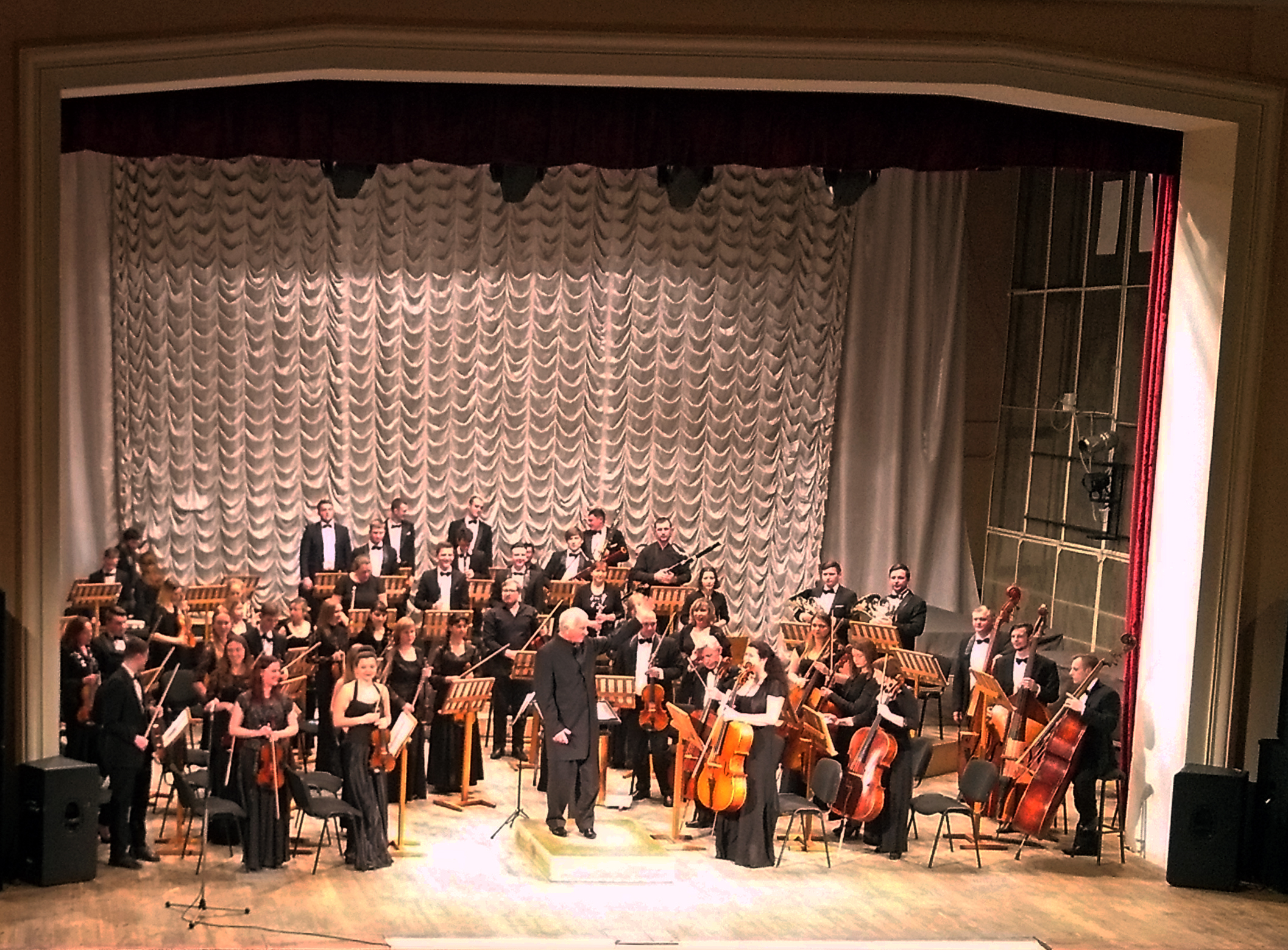 Концерт АСО «Филармония» 7 декабря 2017 года.